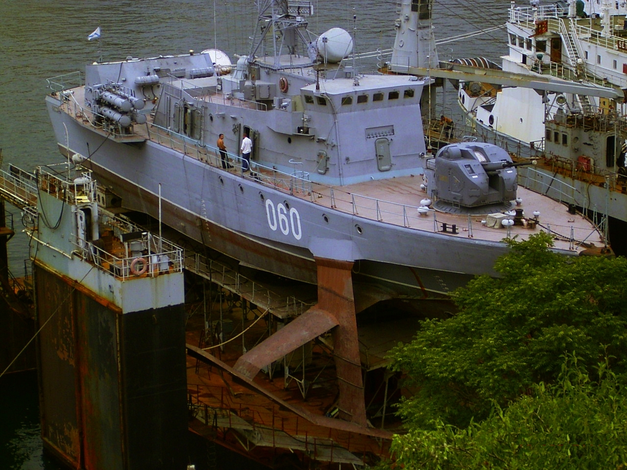 060сушитЛЫЖИ